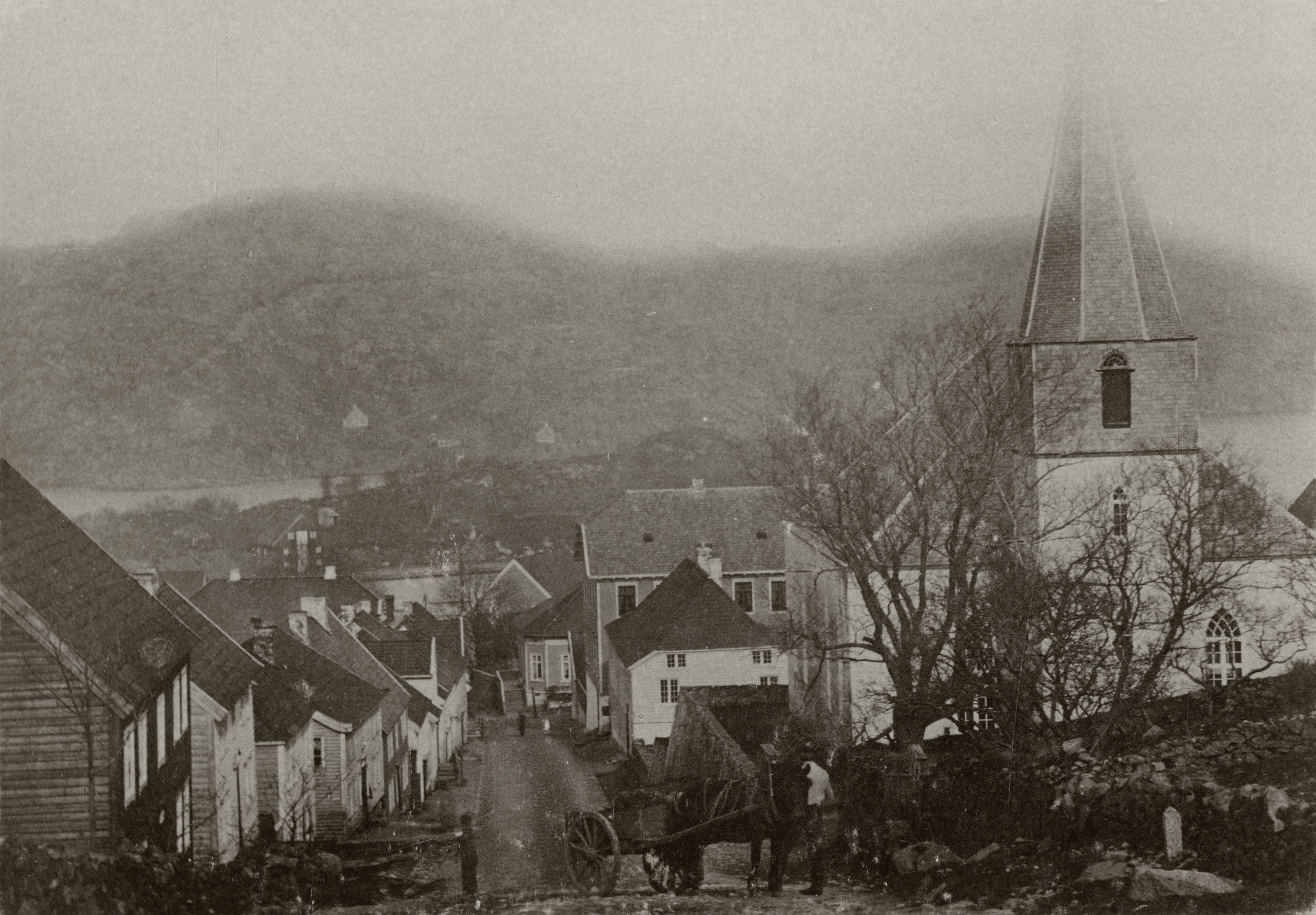 Farsund kirke i Farsund, Vest-Agder Før brannen i 1901 This image on crowdsourcing geotagging platform Fotodugnad